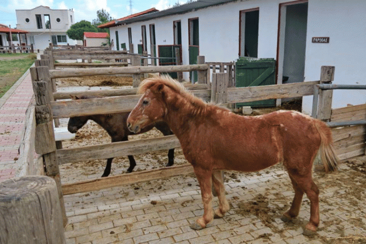 Το μικρόσωμο αλογάκι της Ρόδου